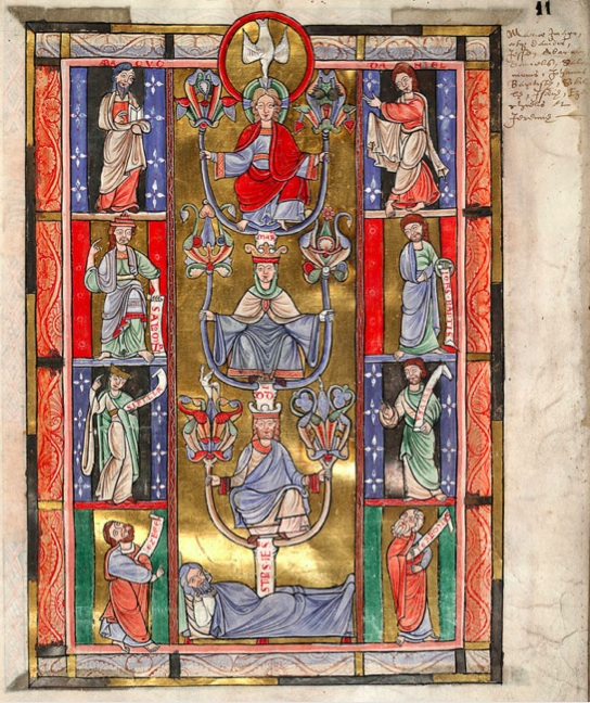 Arbre de Jessé Manuscrit 340 Bibliothèque municipale de Douai